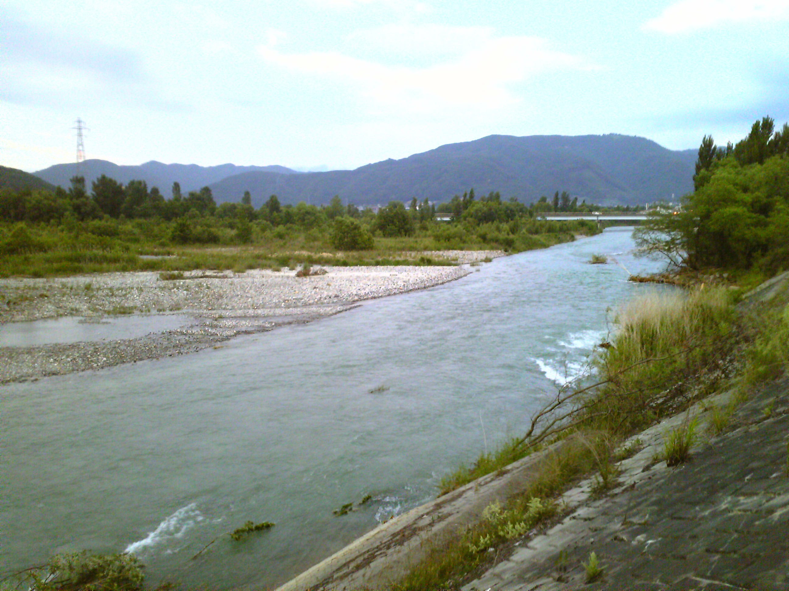 高瀬川。長野県安曇野市穂高北穂高付近より下流方向。奥に安曇橋。